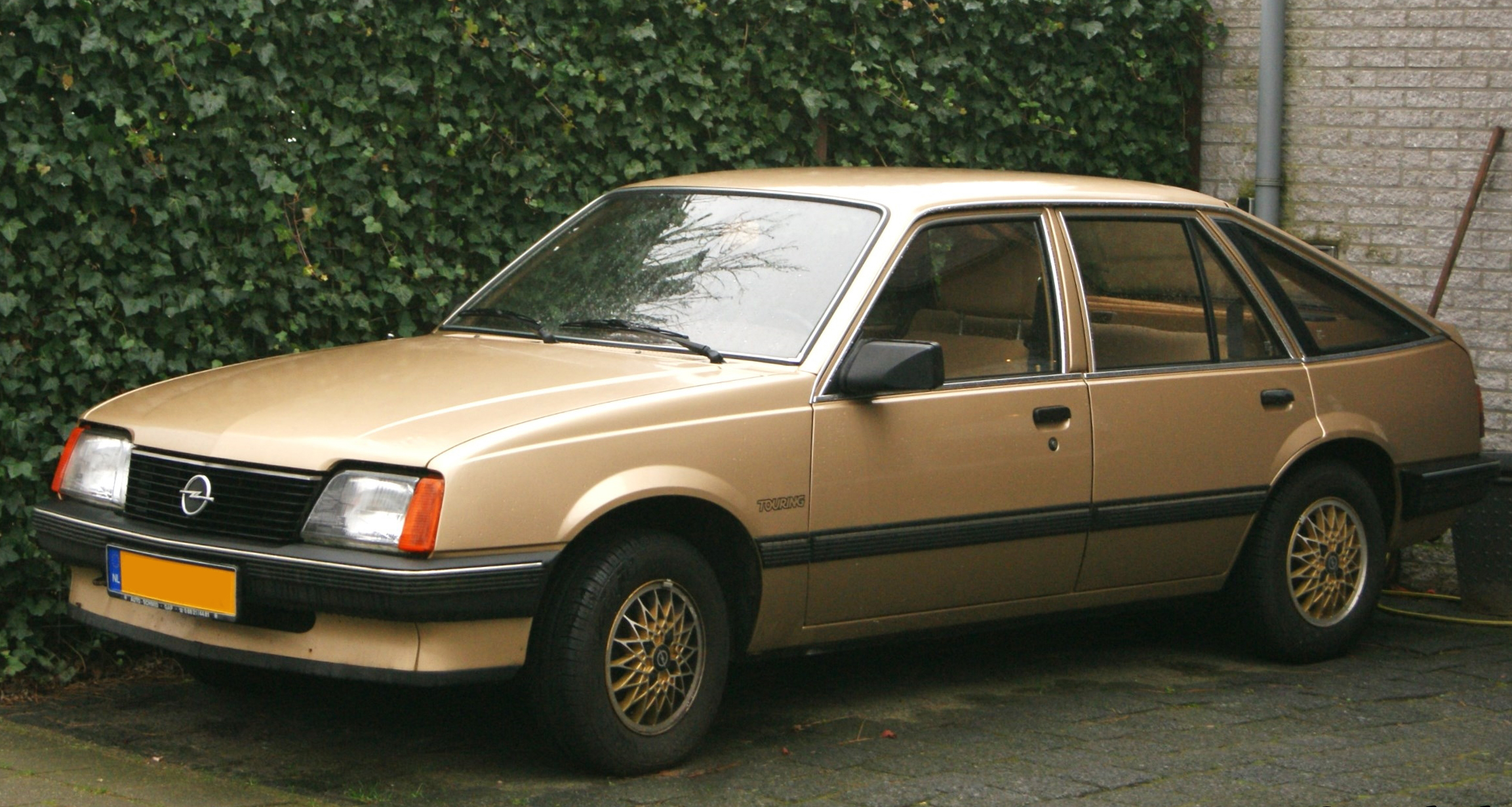 81-ZL-SX